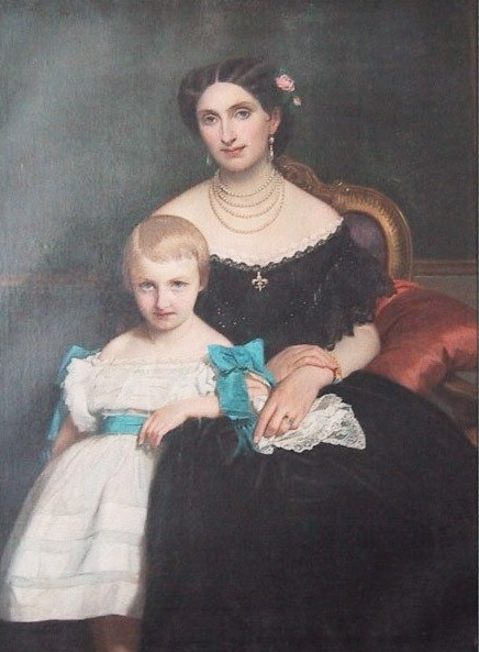 Княгиня Луиза Леопольдовна Волконская, ур. фон Лилиен (1807—1871) с дочерью Зинаидой (1849—1853).